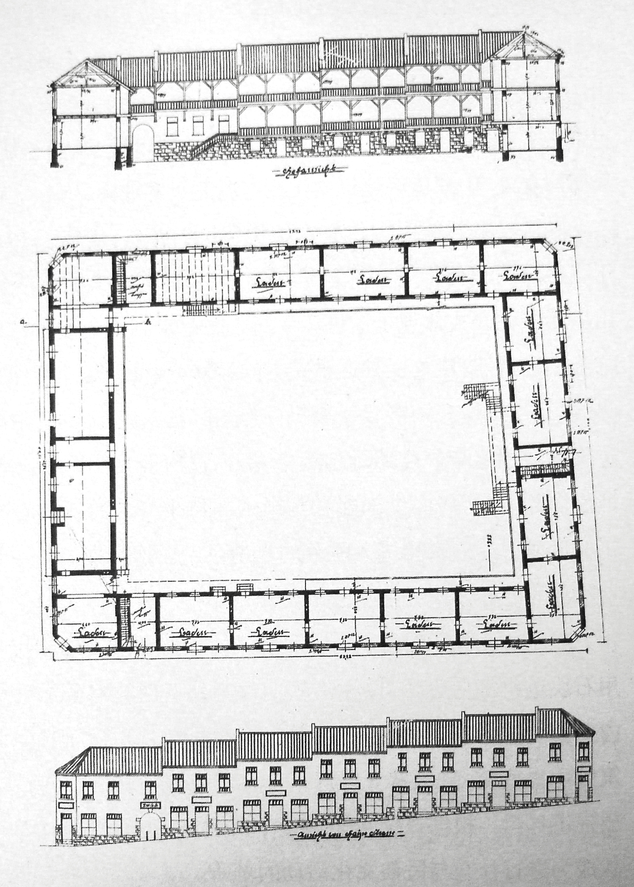 广兴里二期设计图